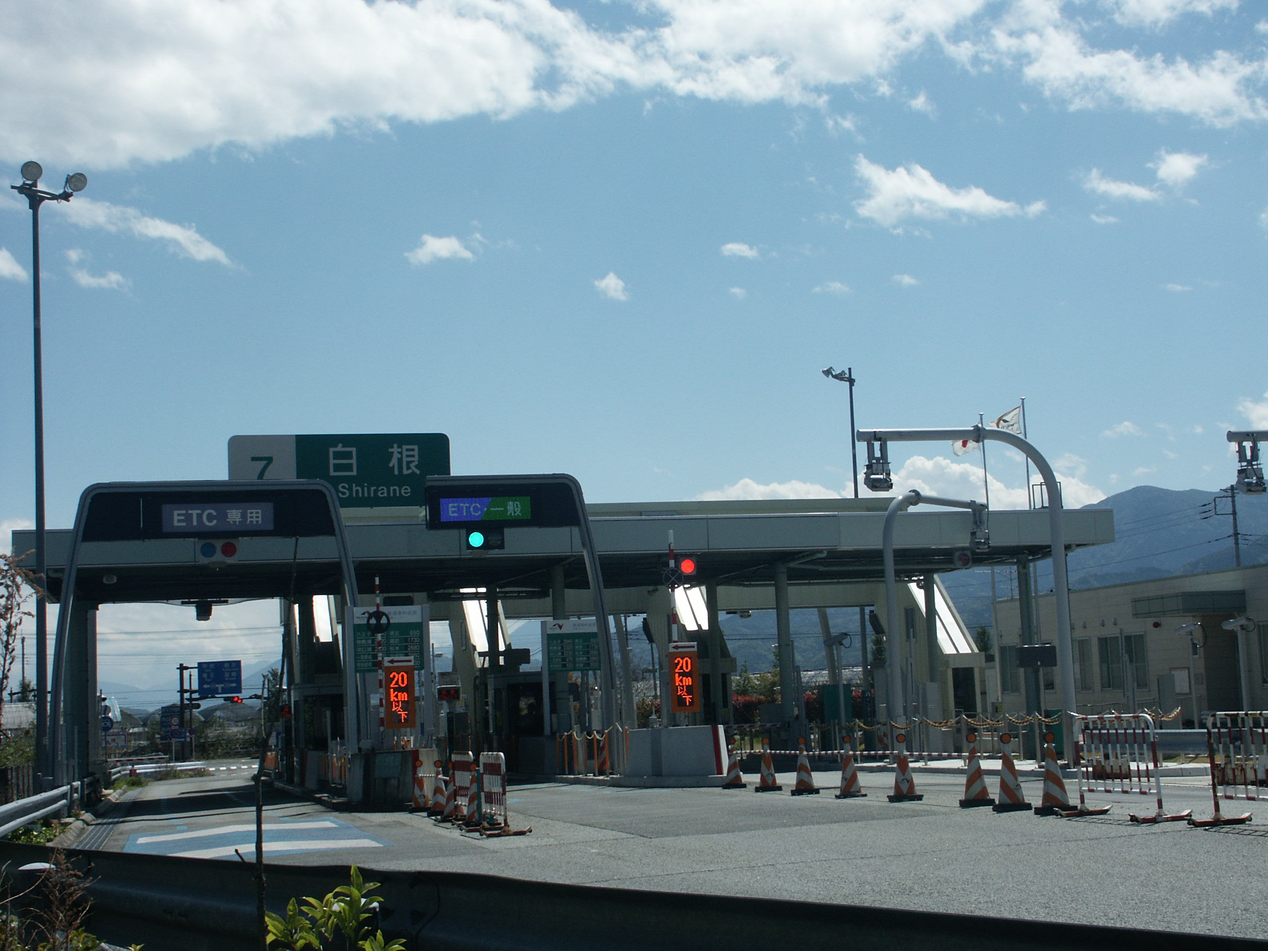 中部横断自動車道白根IC料金所（側道から撮影）